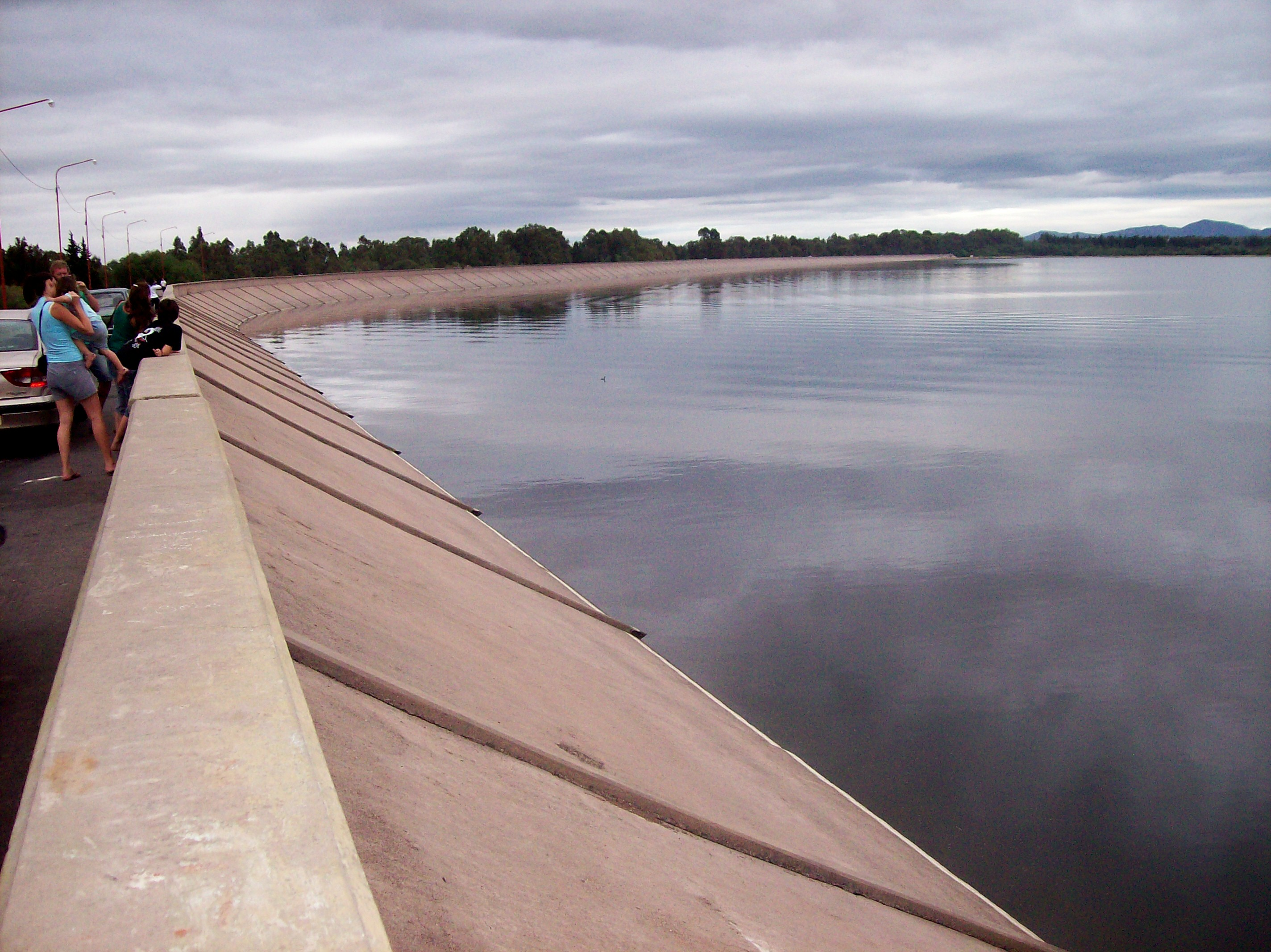 Embalse Cruz del Eje, cerca de la ciudad homónima, en la provincia de Córdoba, Argentina. Puede haber un error de unos 50 m en la ubicación de las coordenadas geográficas